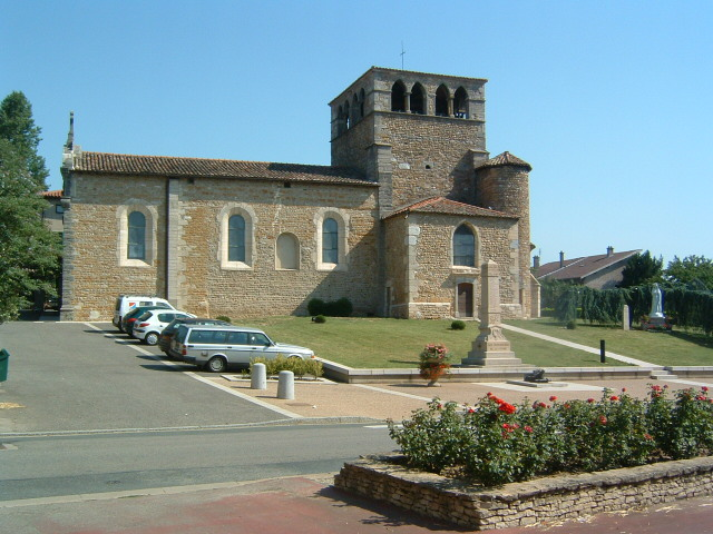 Eglise romane de Montanay.